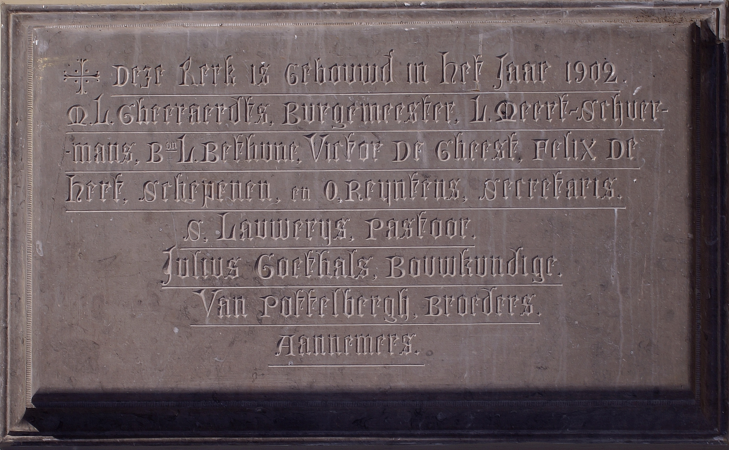 Onze-Lieve-Vrouw van Bijstandskerk (Aalst) - Gedenksteen